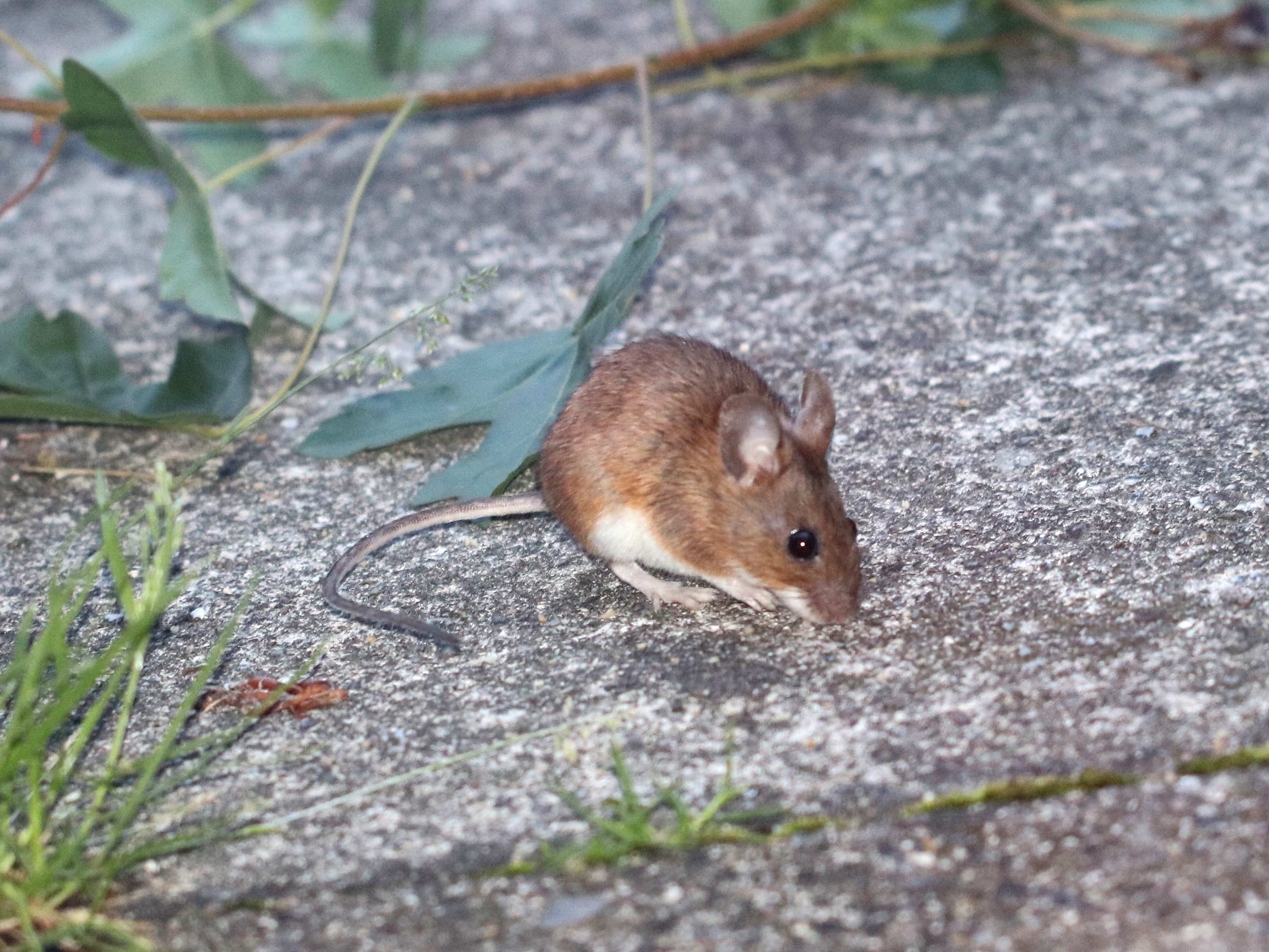 Apodemus flavicollis (Melchior, 1834), Søborg, Denmark, 19 June 2015